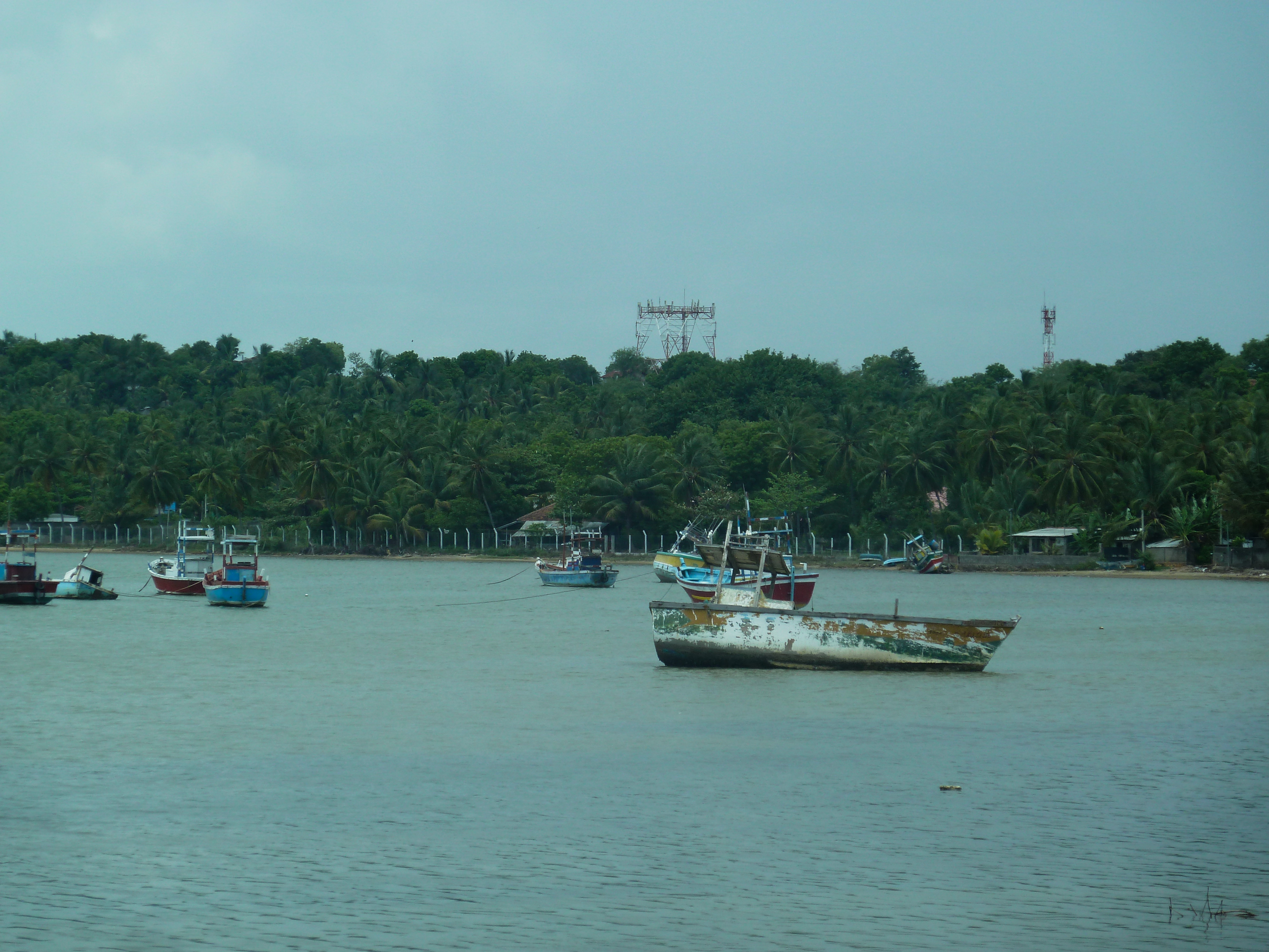 La plage de Trinquemalay, dans la Province de l’Est au Sri Lanka.- Asie du Sud